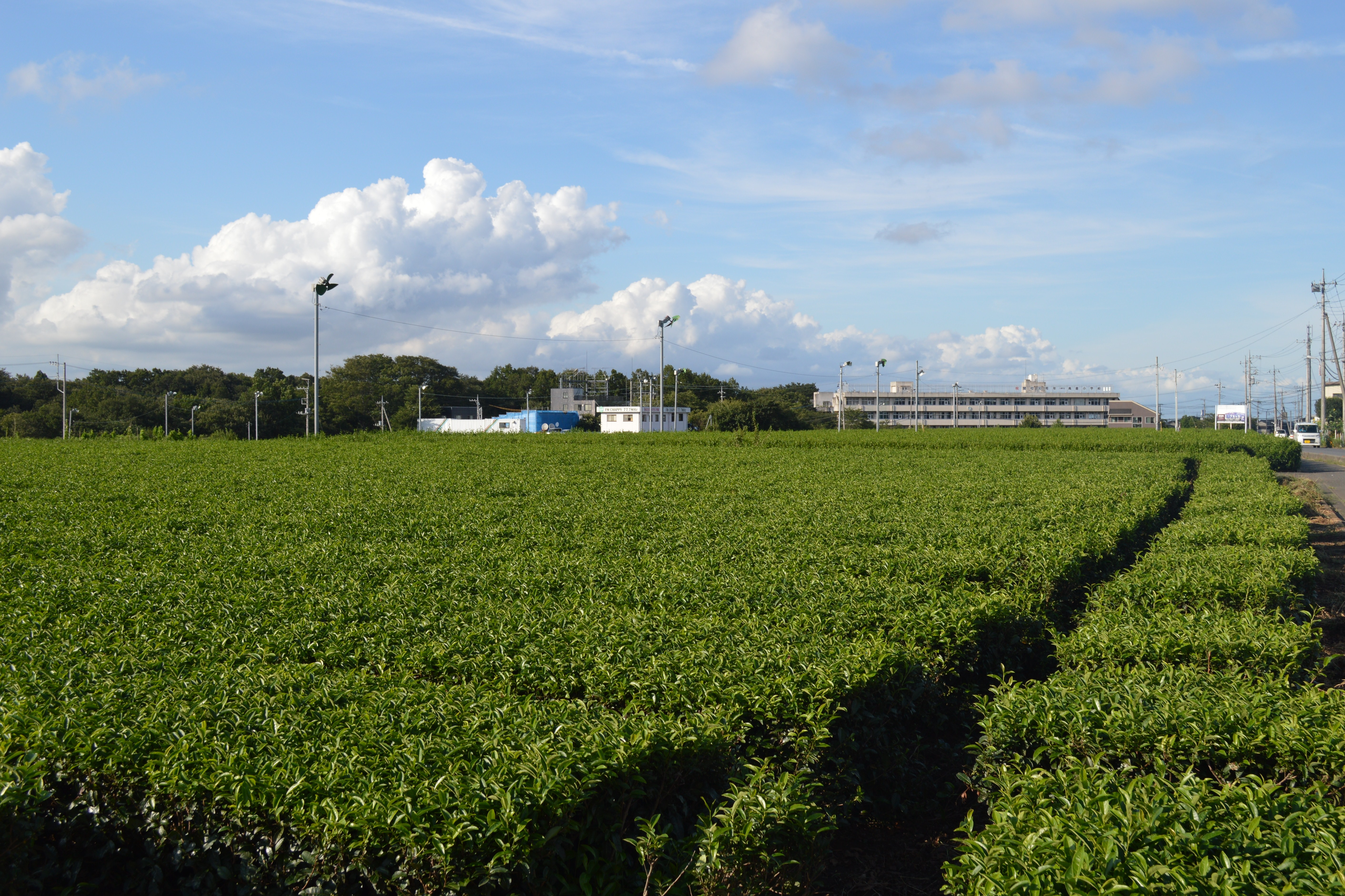 埼玉県の入間市立高倉小学校と狭山茶の茶畑